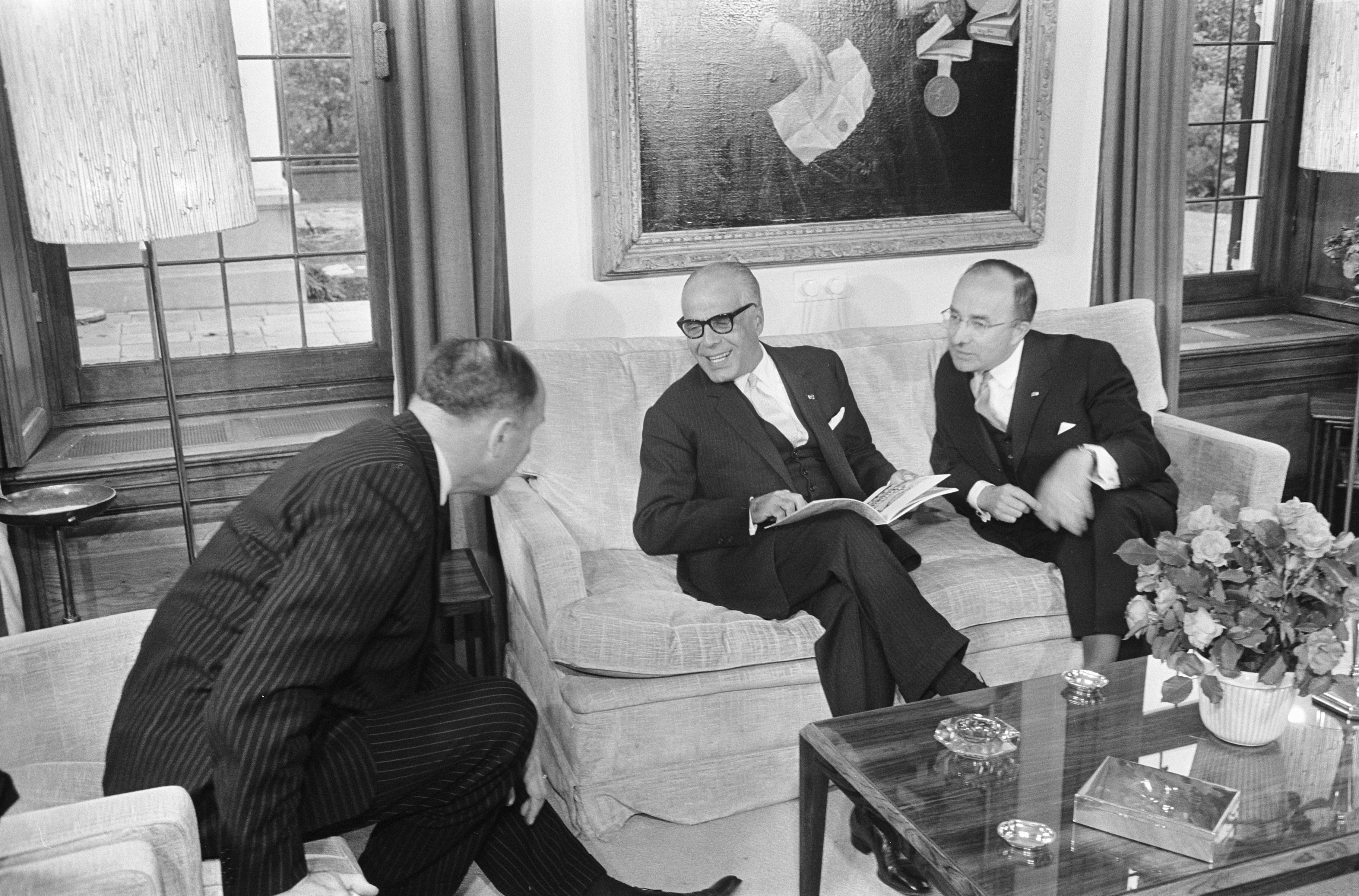 Collectie / Archief : Fotocollectie Anefo Reportage / Serie : [ onbekend ] Beschrijving : President Bourguiba in het Catshuis, nummer 28 v.l.n.r. Luns, Bourguiba en Cals Datum : 7 juli 1966 Trefwoorden : premiers, presidenten Persoonsnaam : Bourguiba, Habib Ben Ali, Luns, J.A.M.H., Luns, Joseph Fotograaf : Koch, Eric / Anefo Auteursrechthebbende : Nationaal Archief Materiaalsoort : Negatief (zwart/wit) Nummer archiefinventaris : bekijk toegang 2.24.01.05 Bestanddeelnummer : 919-3317